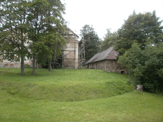 Vaade idast. Kraavi kaevanud 1971. aastal .